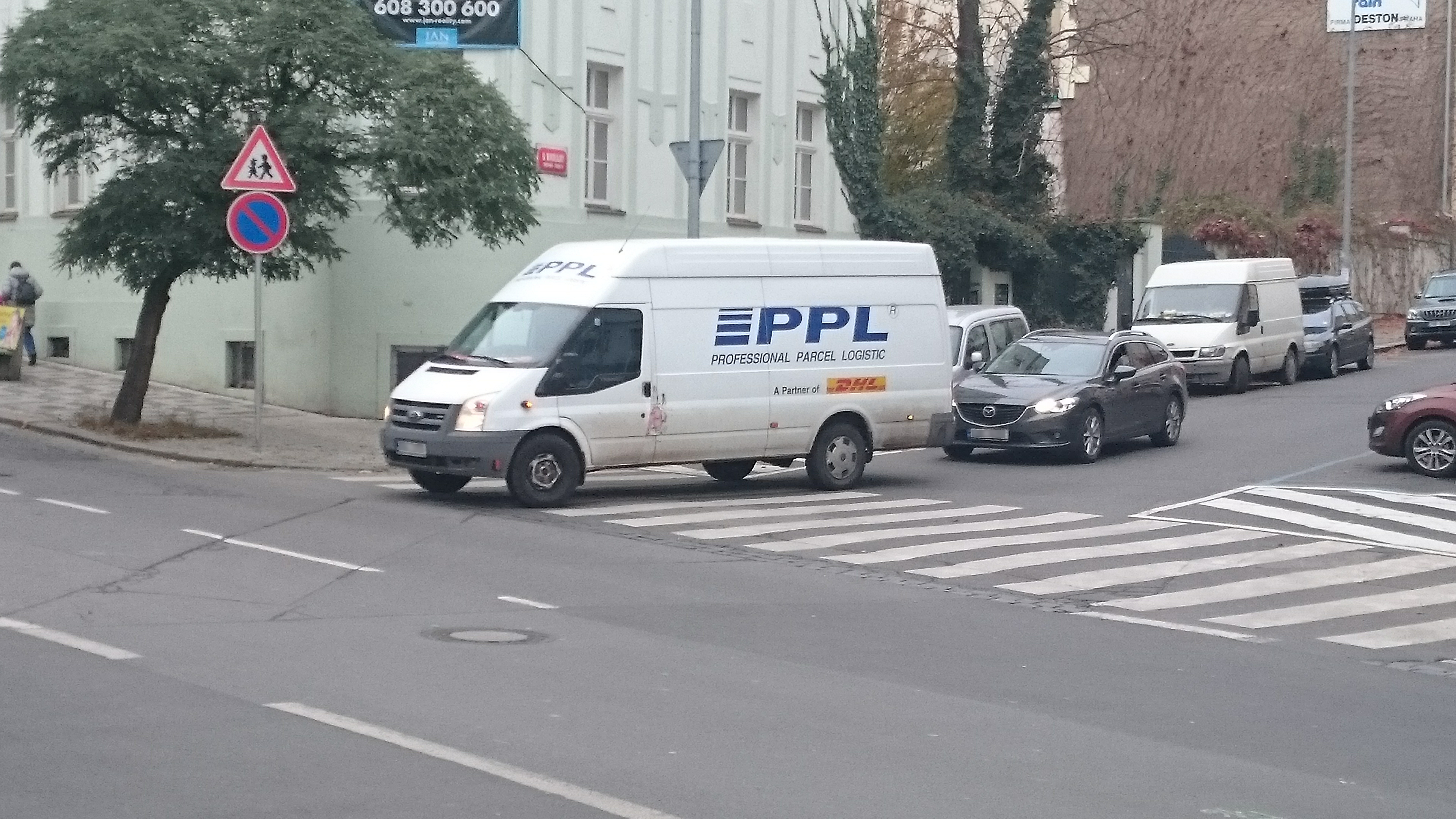 Rozvoz PPL v Praze na Smíchově. Praha, Česká republika.